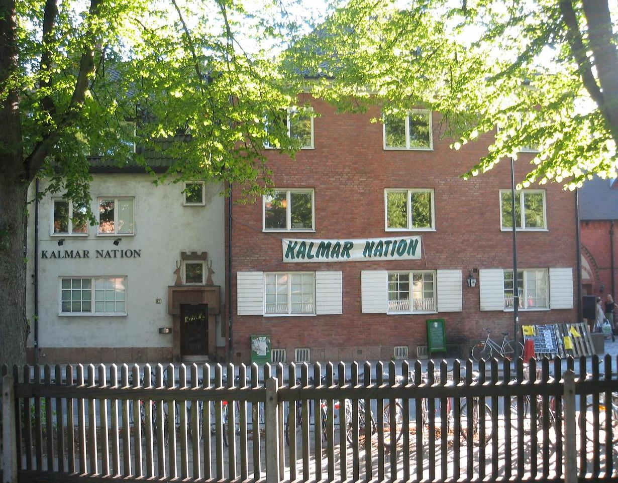 Foto taget av mig Angriffer, Lund september 2006.